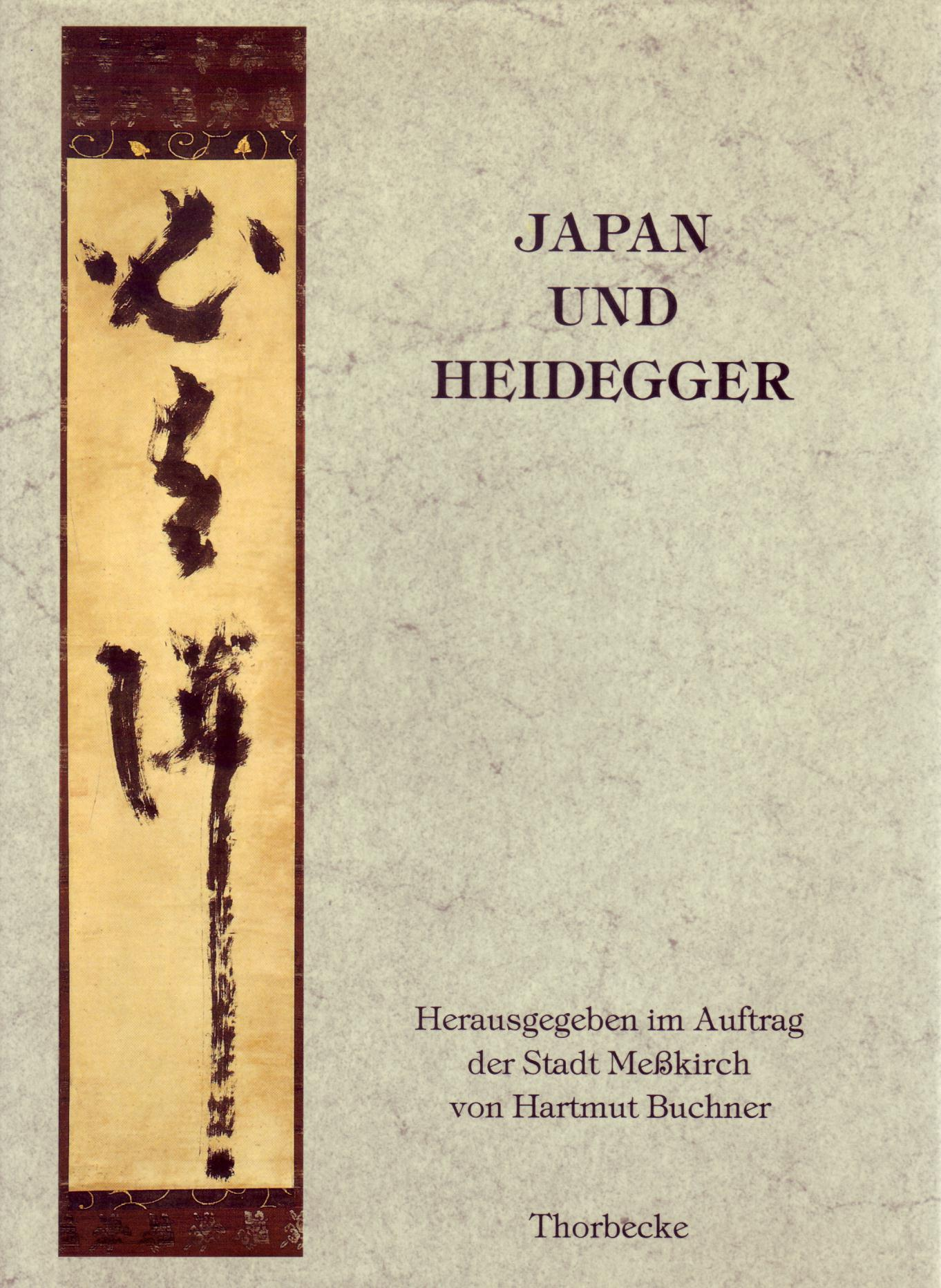 Titelblatt von "Japan und Heidegger", Thorbecke Verlag 1989